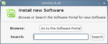 Mintinstall_3.3